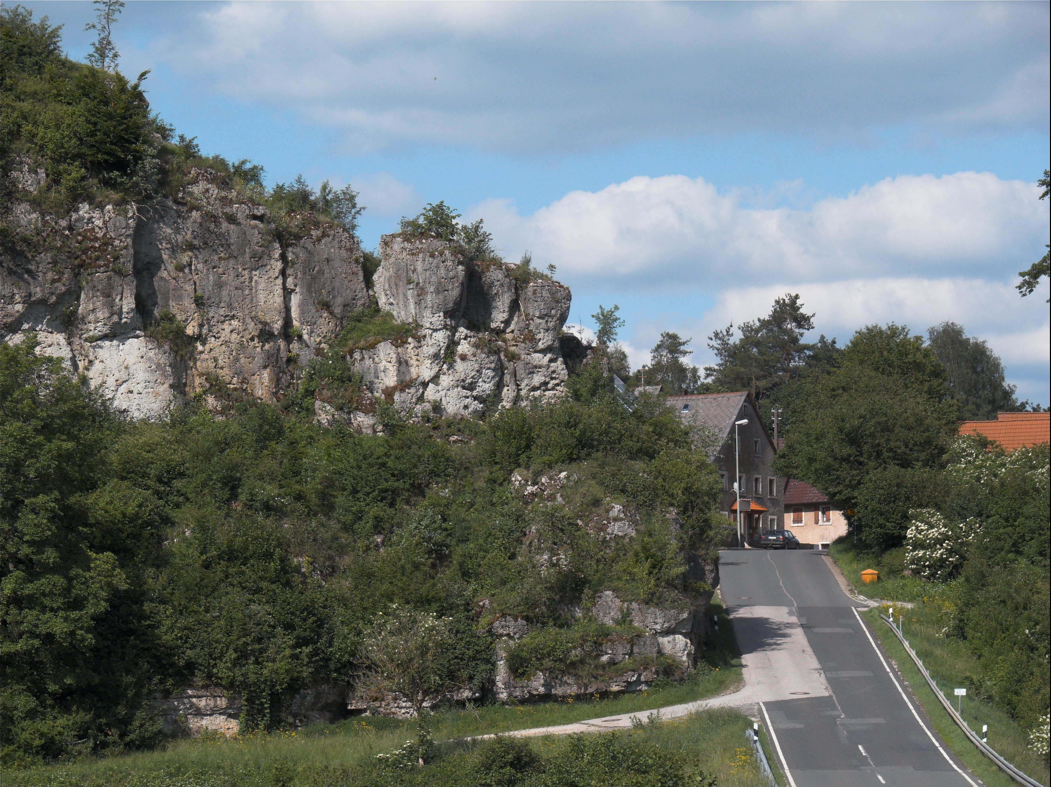 Blick von Westen auf Leupoldstein, einem Ortsteil von Betzenstein. Im Vordergrund die Bundesstraße 2